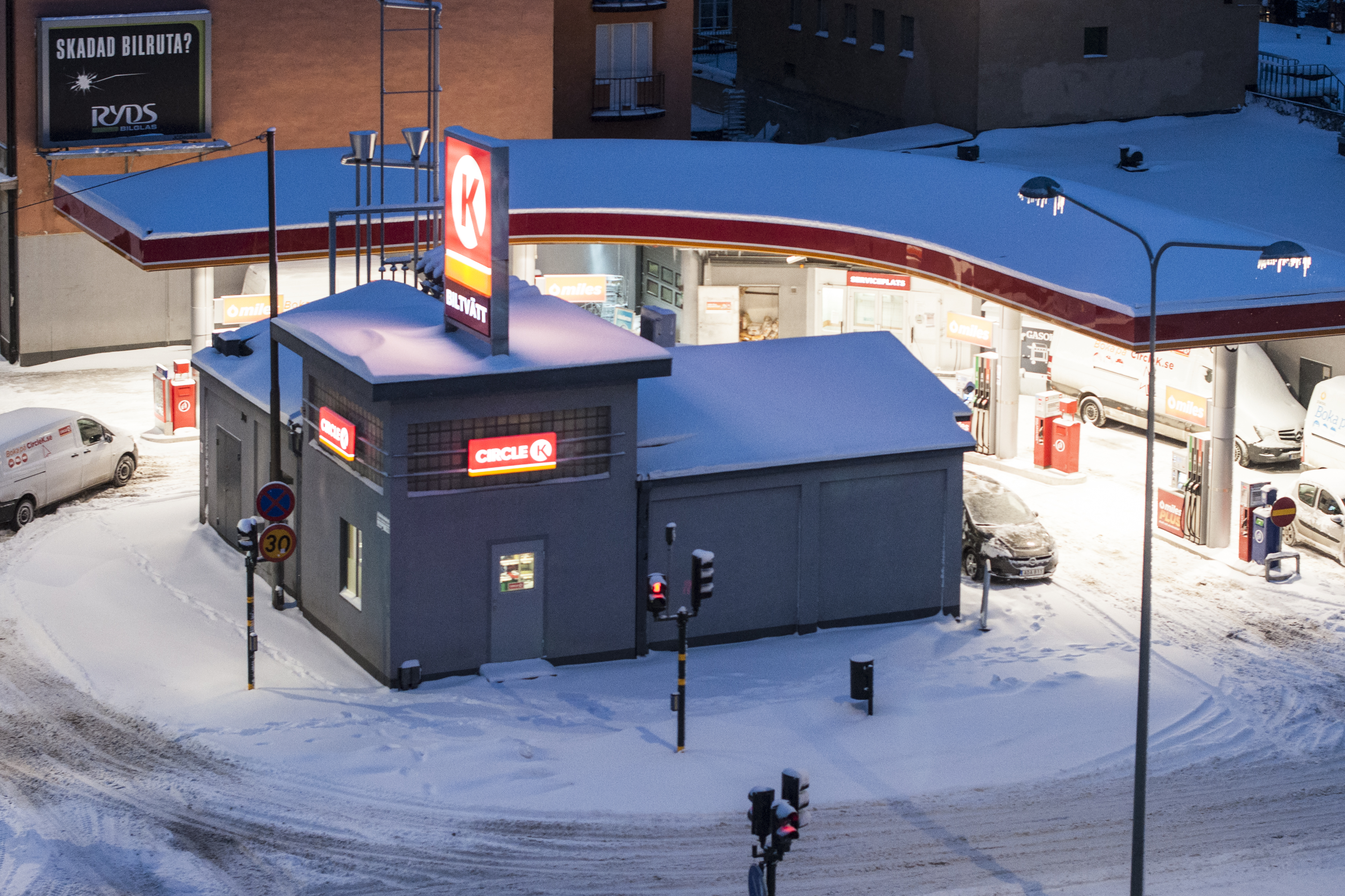 Circle K, Birger Jarlsgatan 68 Stockholm Nybyggnadsår 1926 - 1927. J. Persson (Byggmästare) Krooks Petrolium Olje AB (Byggherre)